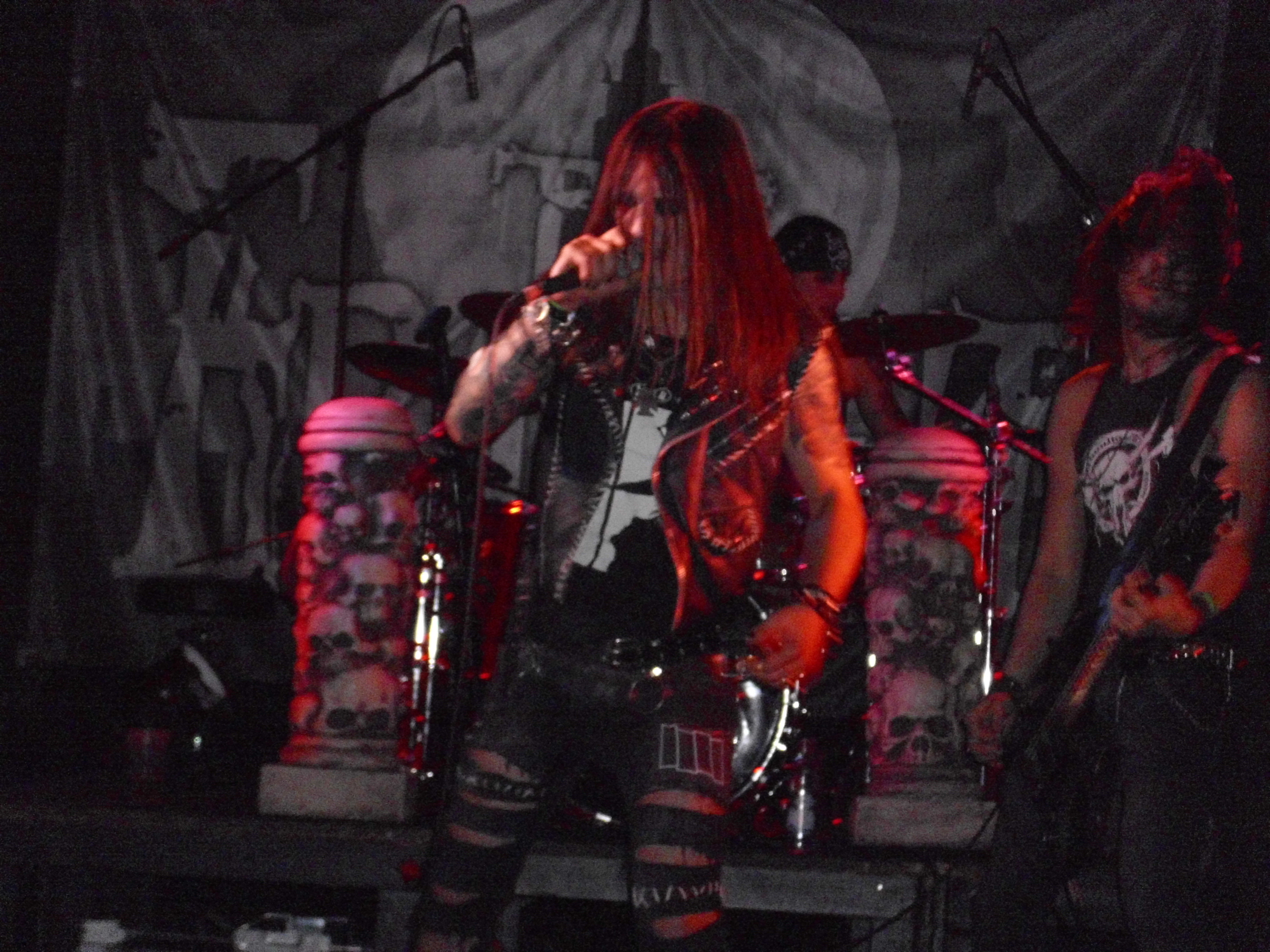 The Fright-Konzertfoto